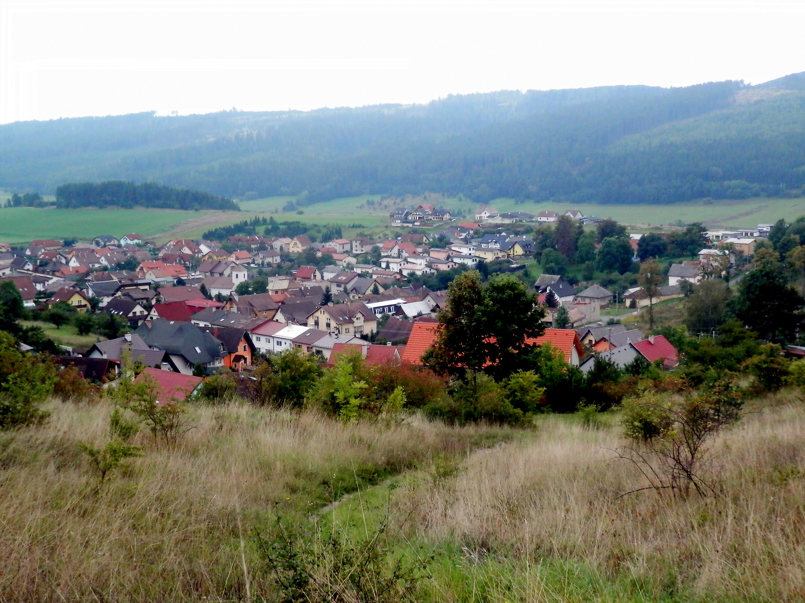 Obec Gánovce je známa najmä lokalitou Hrádok, kde roku 1926 bola v kuse travertínu nájdená časť lebky, vyplnená travertínom. Antropologicky bolo zistené, že ide o vyliatok mozgovne neandertálskeho človeka, ktorý v tejto oblasti žil už pred 105 000 rokmi. Okres Poprad, Slovensko.